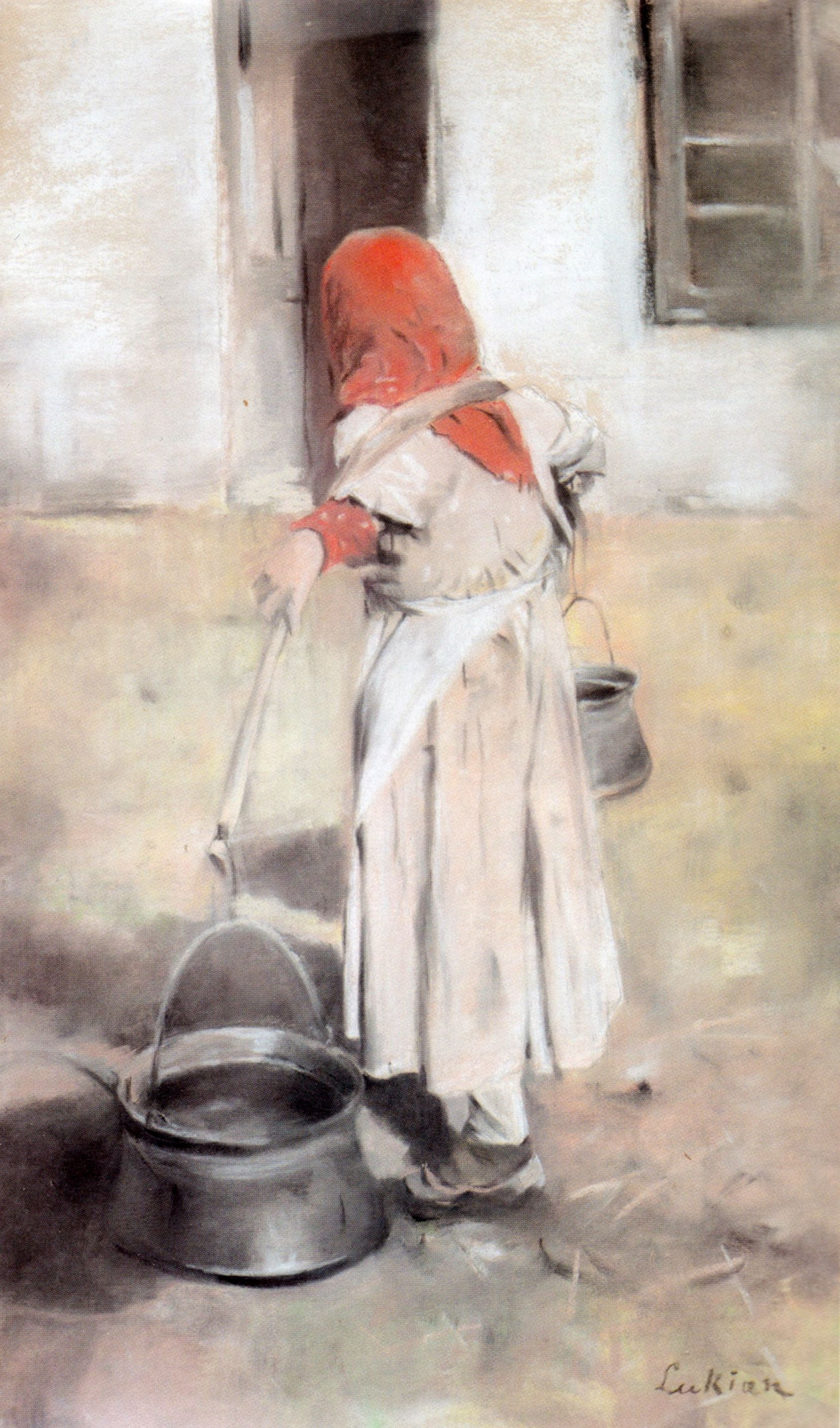 După apă, pastel pe carton, 0.614 x 0.370 m, semnat drepta jus cu negru Luchian, Muzeul Toma Stelian, MNAR - Cabinetul de Desene și Gravuri, inv. 24849/260